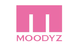 moodyzブランドロゴ